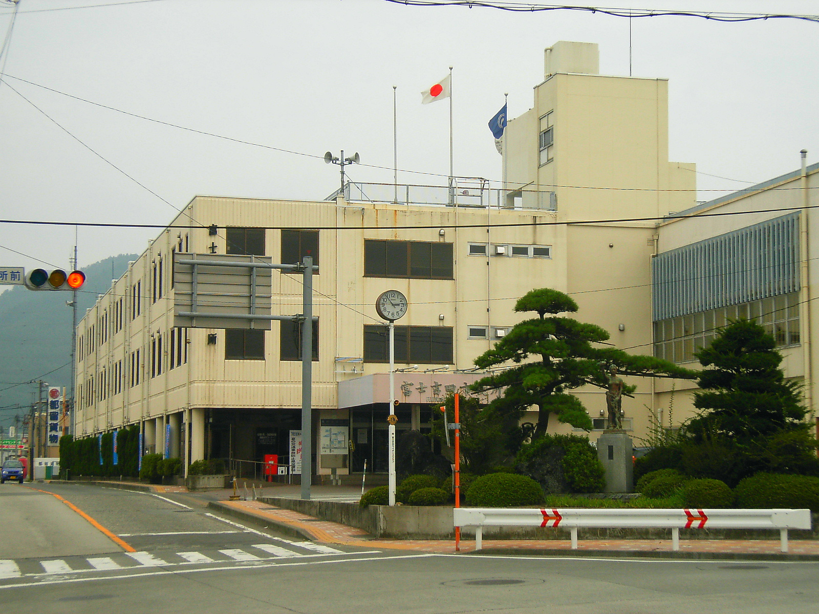 Fujiyoshida City Hall. Fujiyoshida, Yamanashi prefecture, Japan.